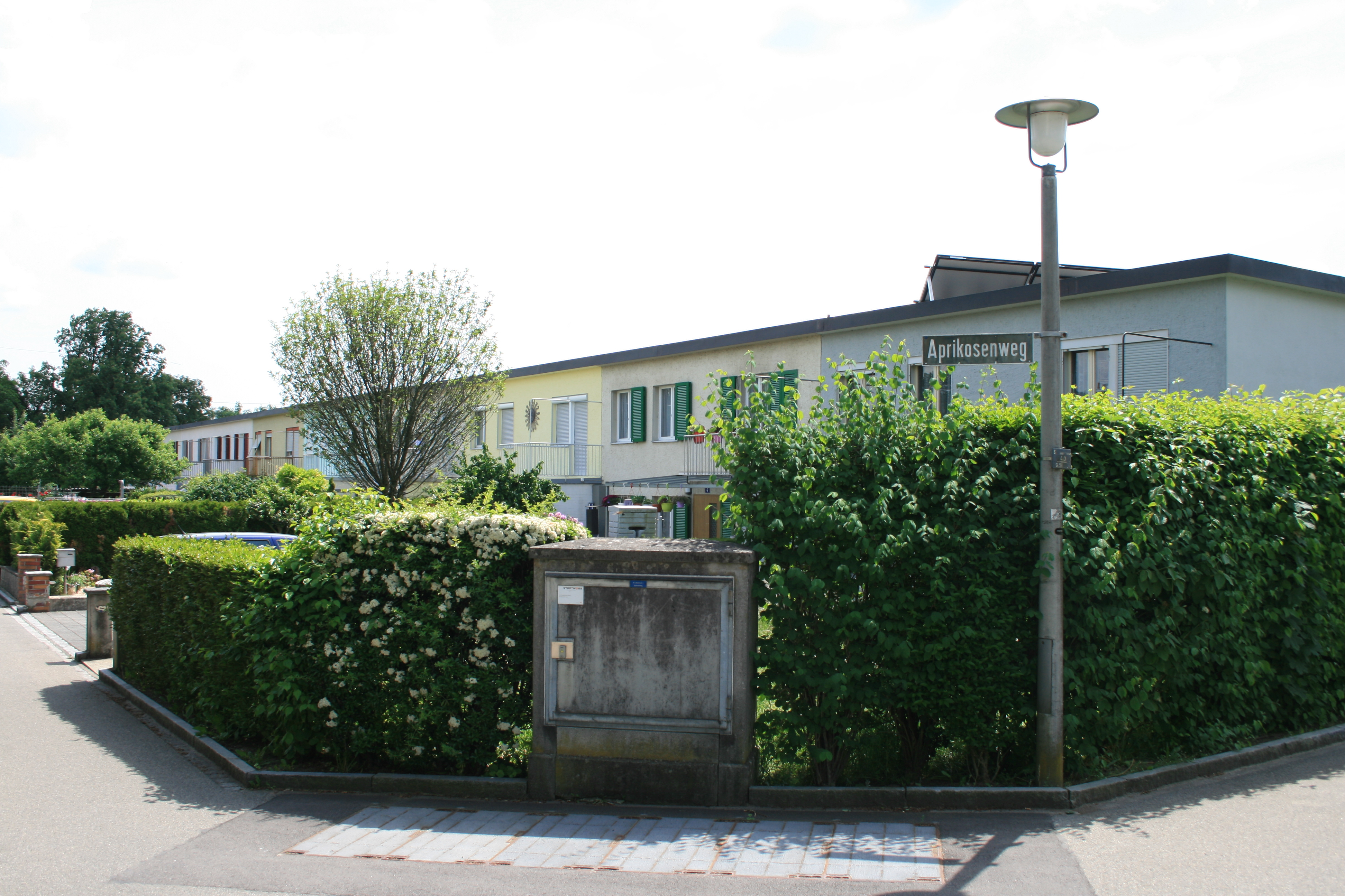 Aprikosenweg in der Siedlung Stadtrain.)